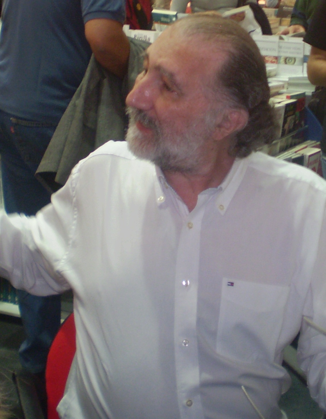 Sendra en la Feria del Libro 2010